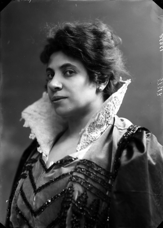 Elvira Casazza fotografata da Mario Nunes Vais